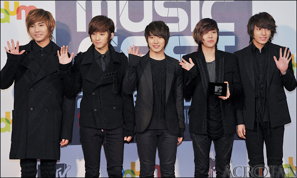 FT 아일랜드. 2011년 2월, MTV-DAUM 뮤직 페스트에서.